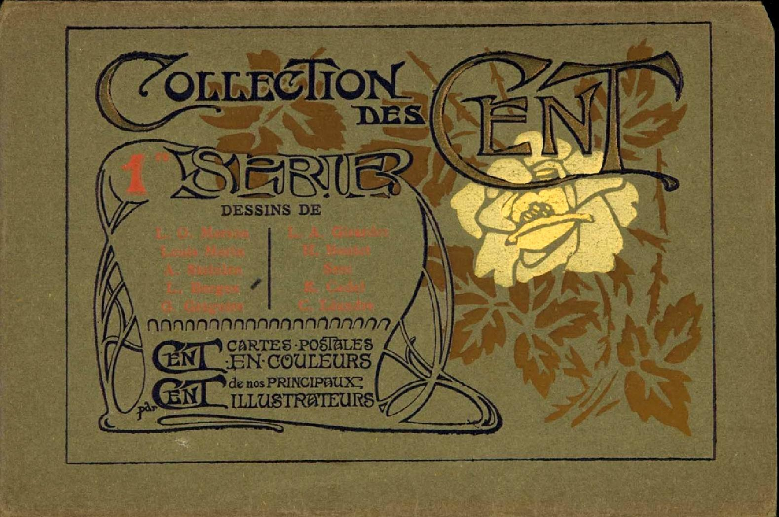 Pochette Collection des cent 1re série